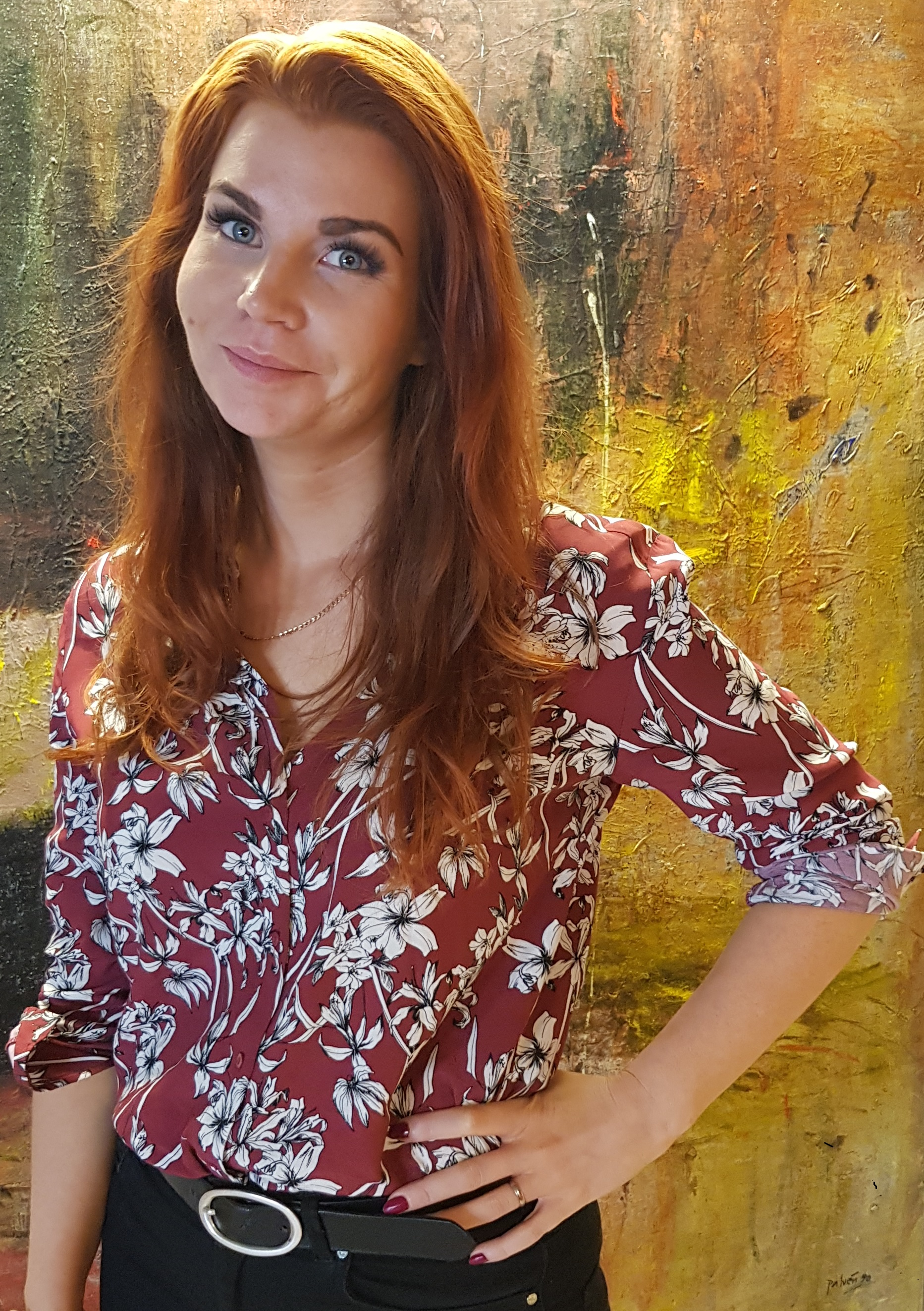 Louise Erixon, kommunalråd i Sölvesborgs kommun